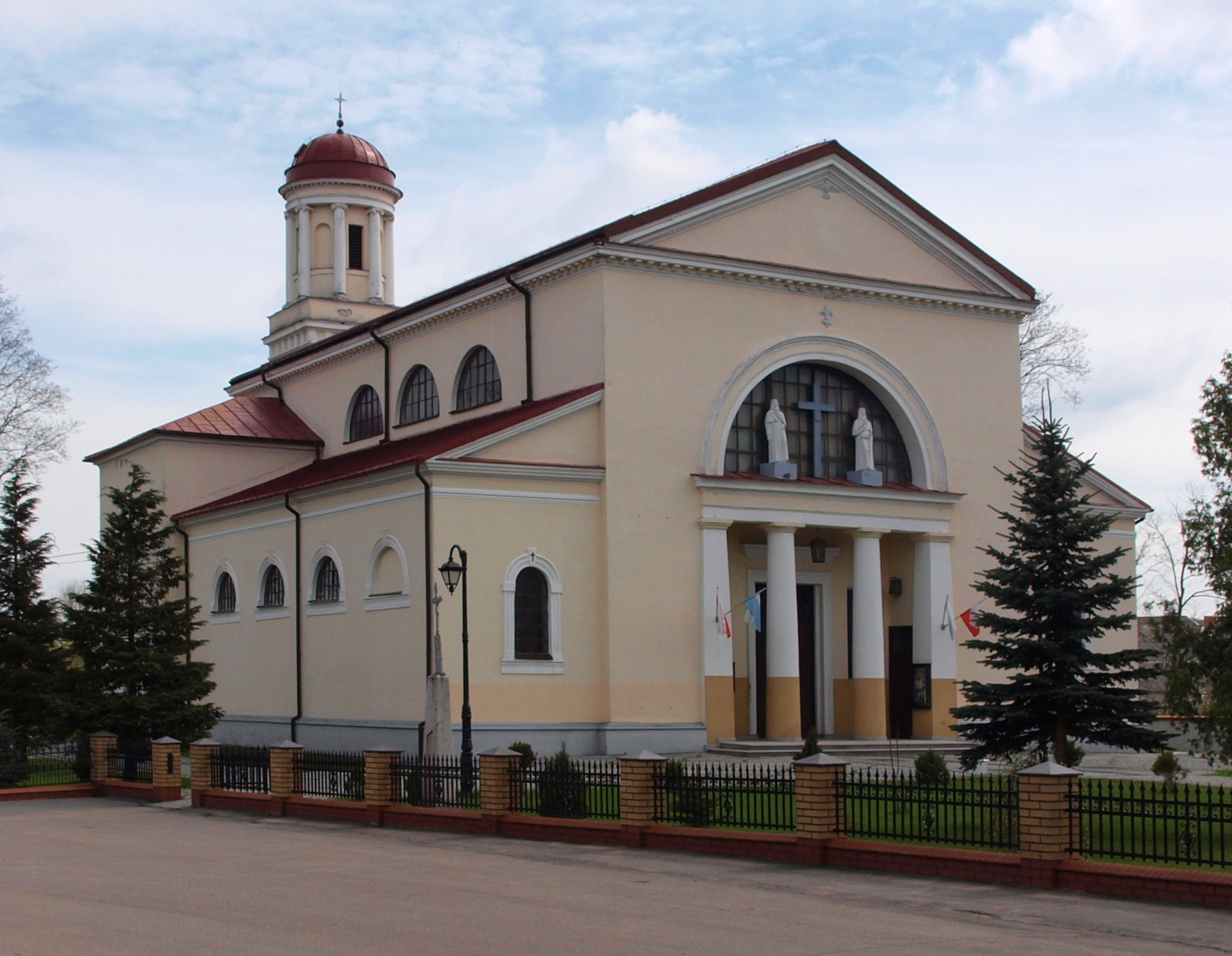 Kościół pw. Świętej Trójcy w Raczkach (pow. suwalski)